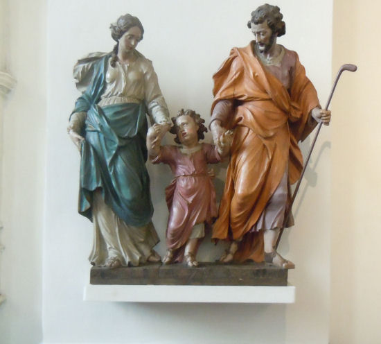 Kerk Beveren, groep H familie door Walter Pompe, 1760